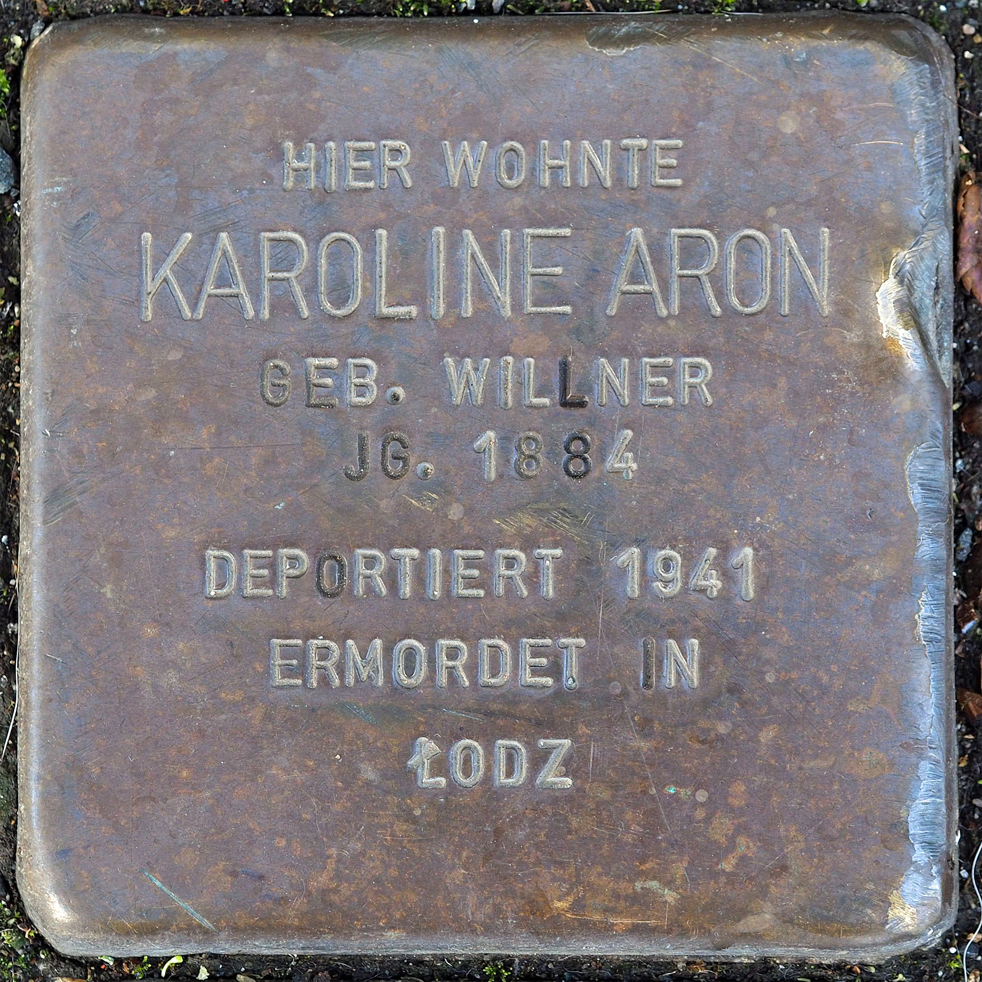 Stolpersteine MG: Aron, Karoline